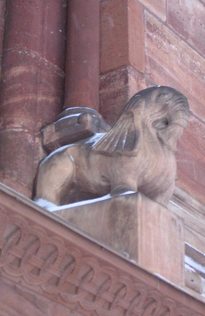 Beschreibung: Darstellung eines Elefanten am Chor des Basler Münster Quelle: 27.02.2005, selbst fotografiert Fotograf / Zeichner: Wladyslaw Sojka Andere Versionen: (für die GNU FDL) 22:17, 27. Feb 2005 Wladyslaw Sojka 665 x 1024 (68496 Byte) (Elefant)